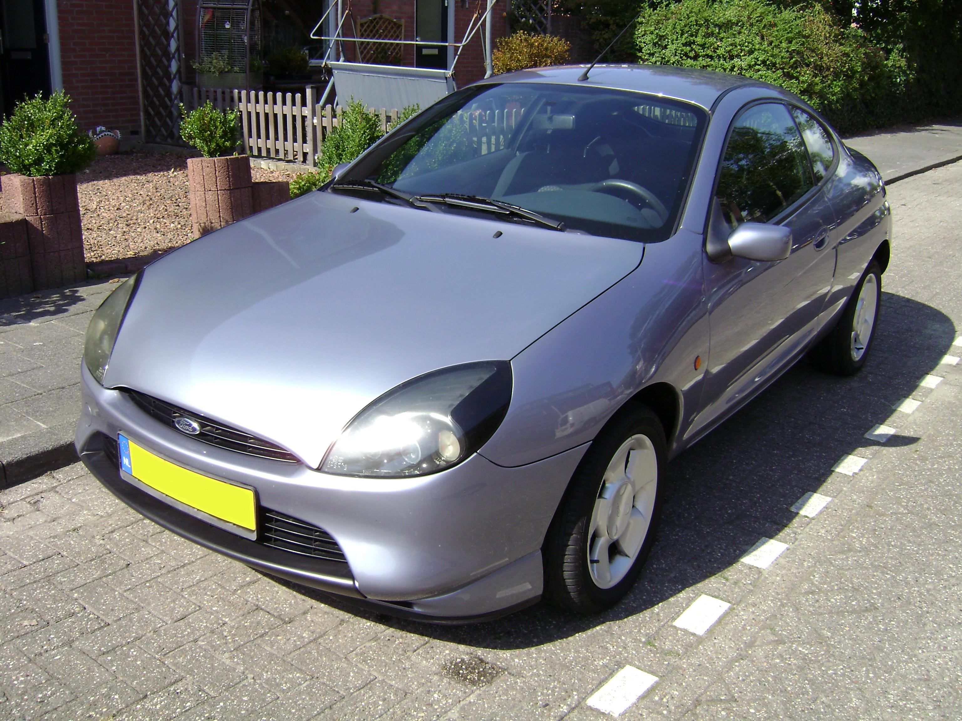 ford puma voorkant